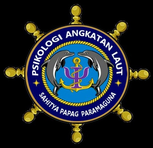 Dinas Psikologi TNI Angkatan Laut